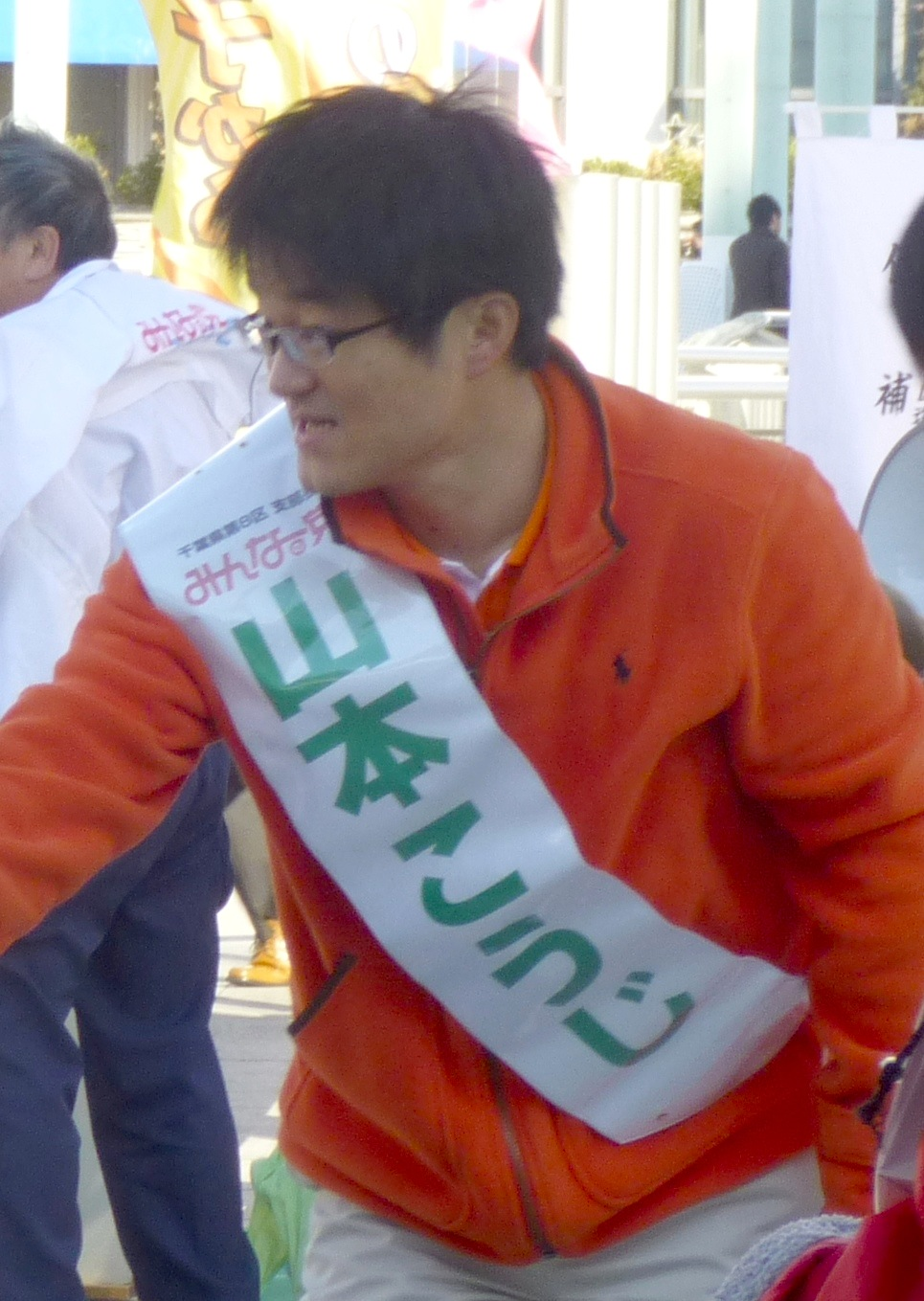 山本 幸治（やまもと こうじ [Yamamoto Kōji]、1971年12月4日 - ）は、日本のプロボウラー。